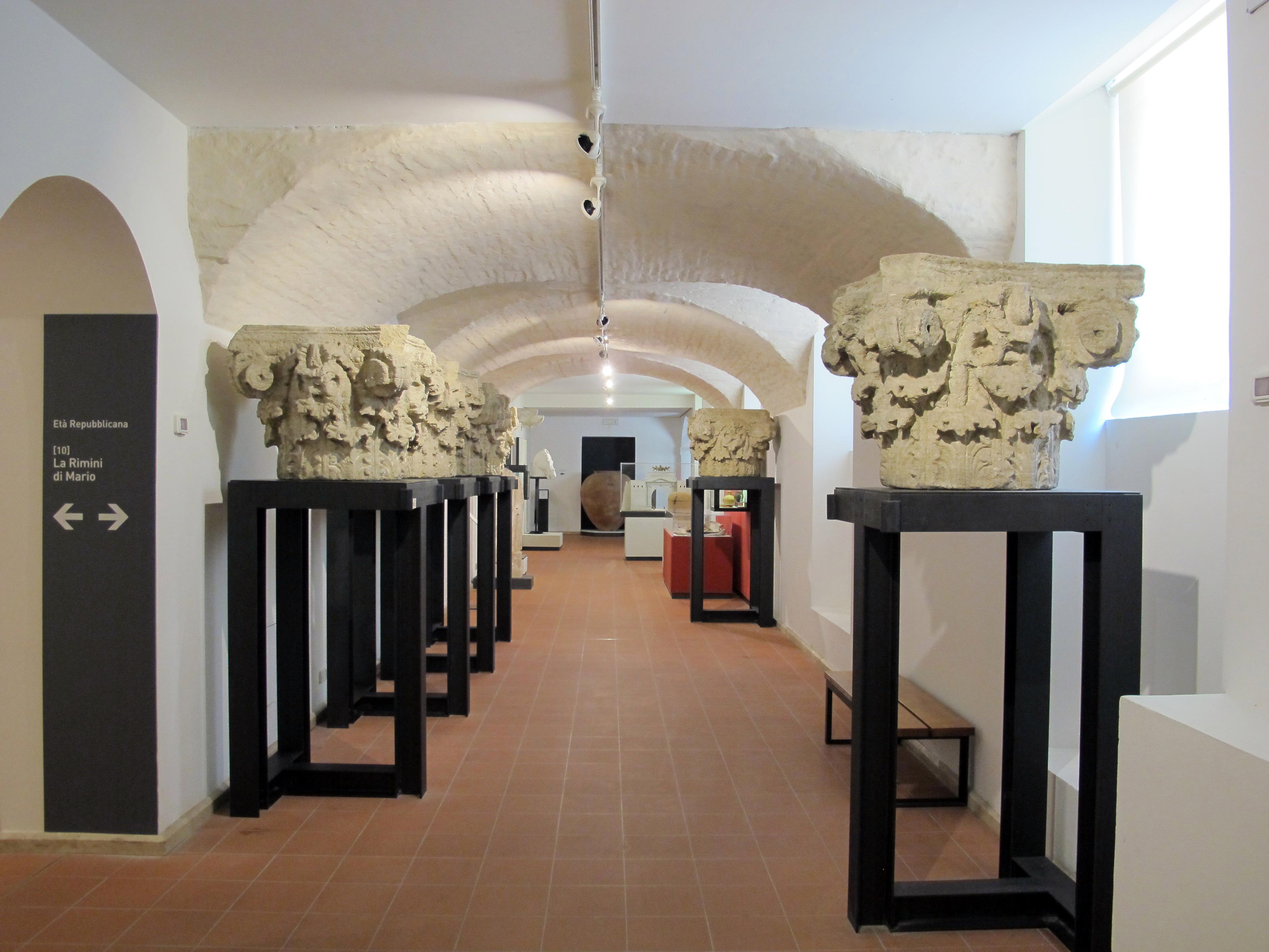 Museo della città di Rimini, sezione archeologica, piano interrato.